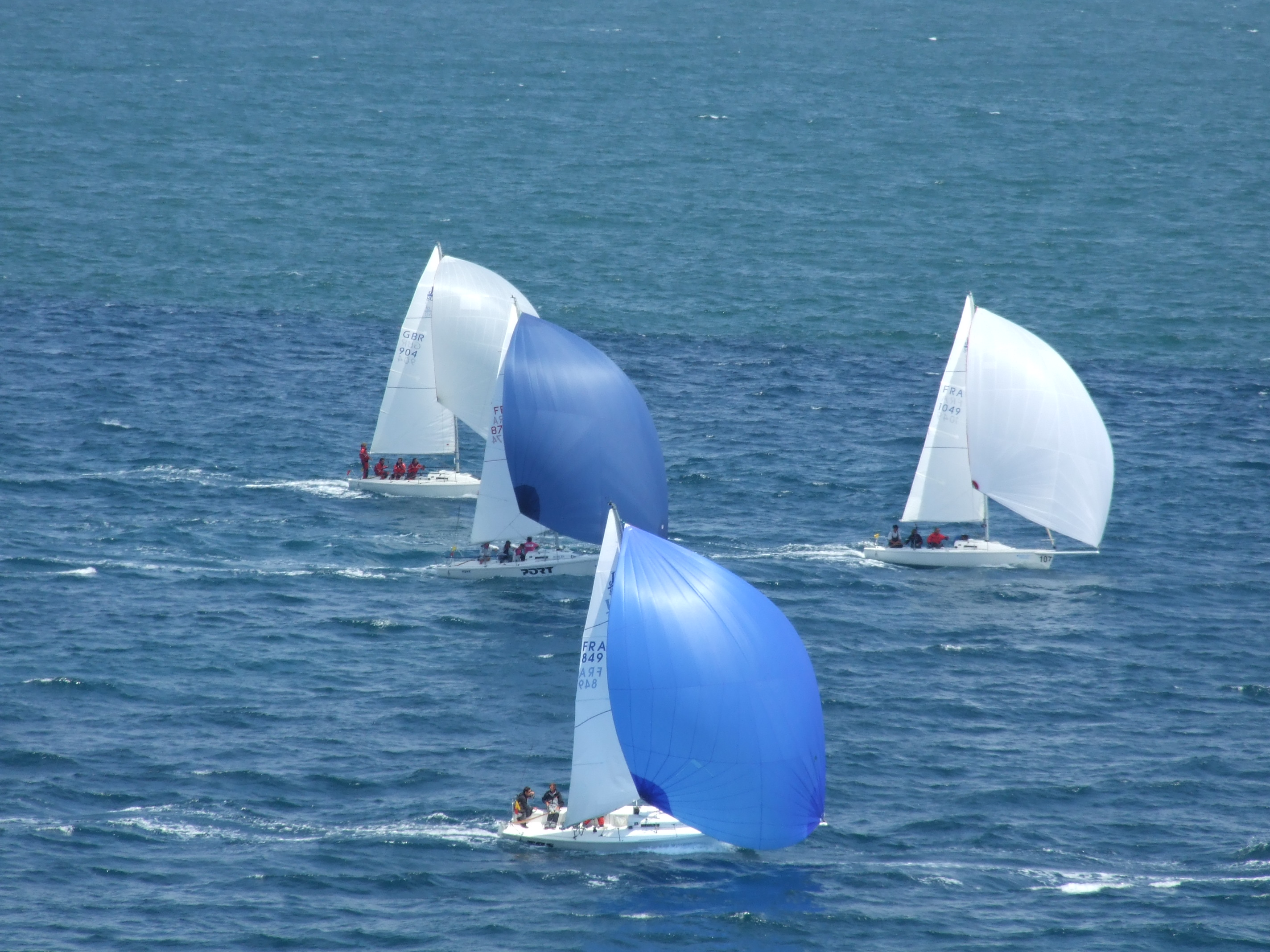 Campeonato Mundial de J80 en Santander, 2009